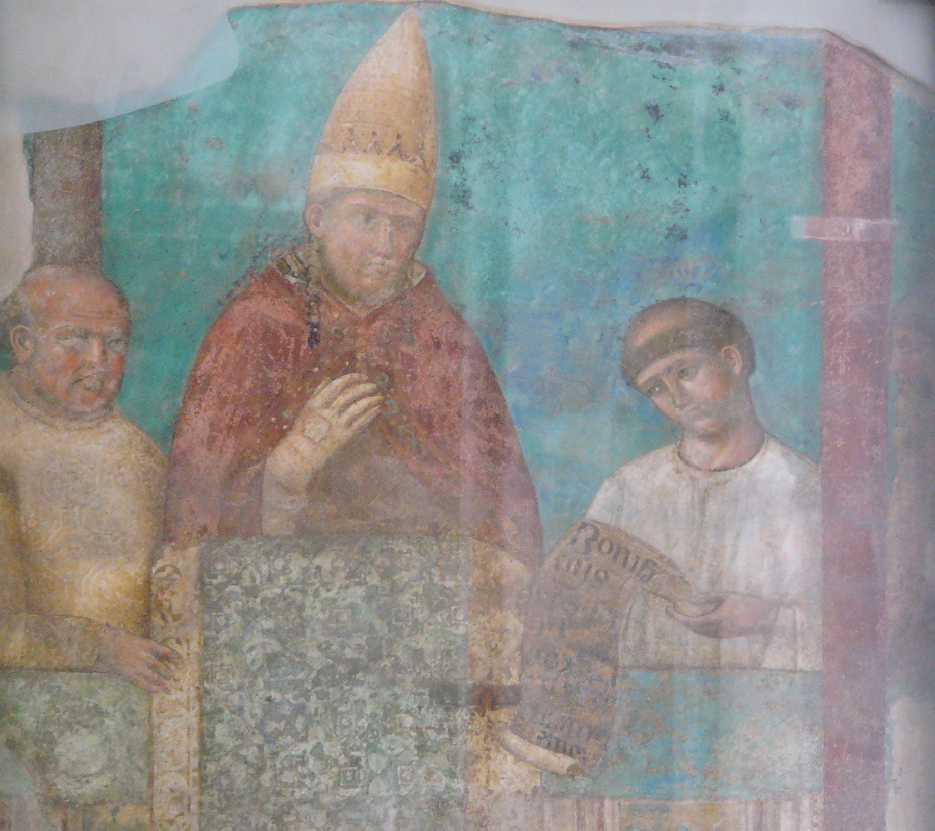 Das Foto zeigt ein mittelalterliches Fresko von Papst Bonifatius VIII. Es stammt aus dem alten Lateranspalast und befindet sich heute in der Lateransbasilika. Gemalt wurde dieses Bild von Giotto di Bondone in den Jahren 1298 bis 1300.